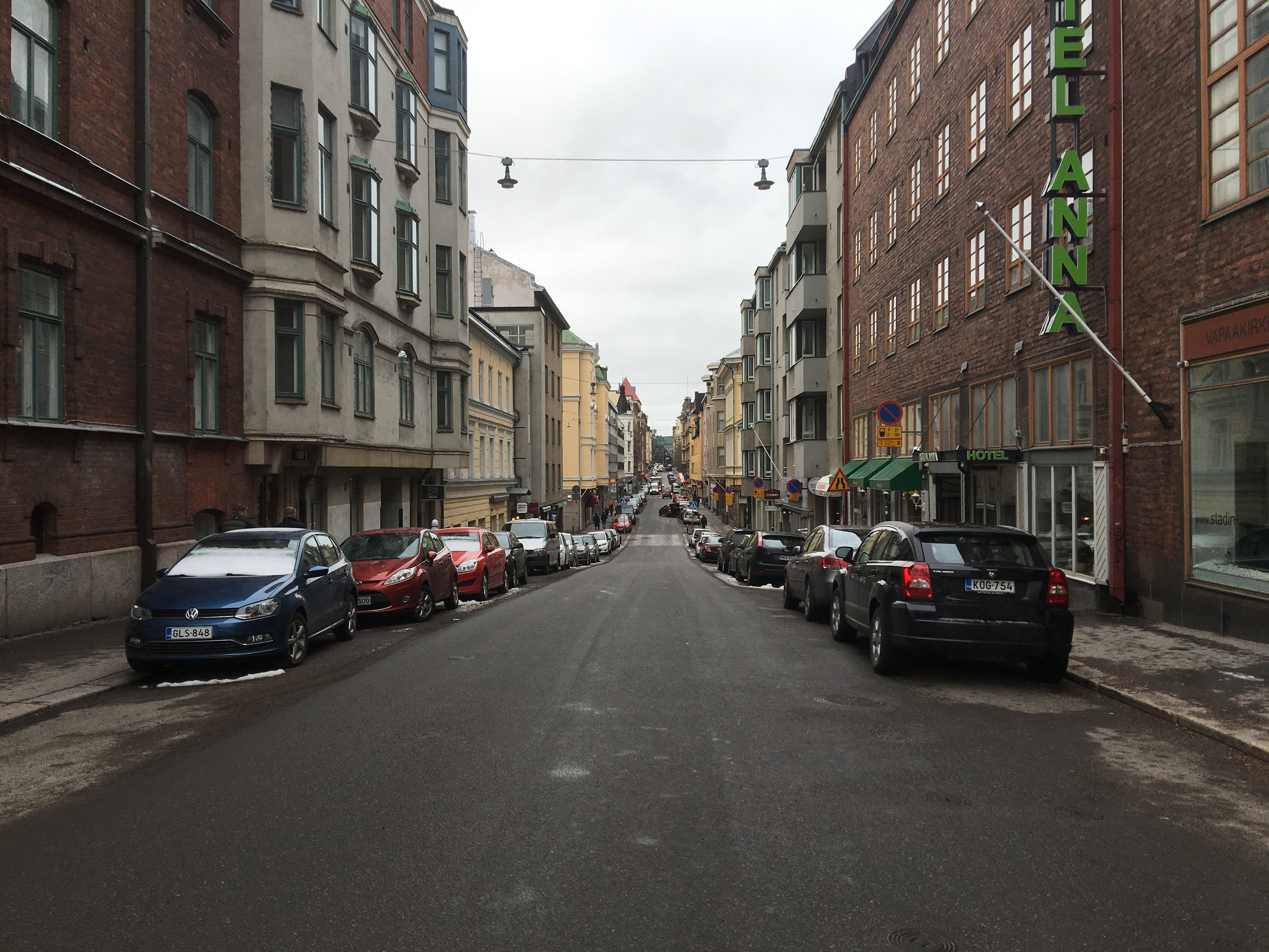 Annankatu Ratakadun ja Annankadun risteyksestä kuvattuna.